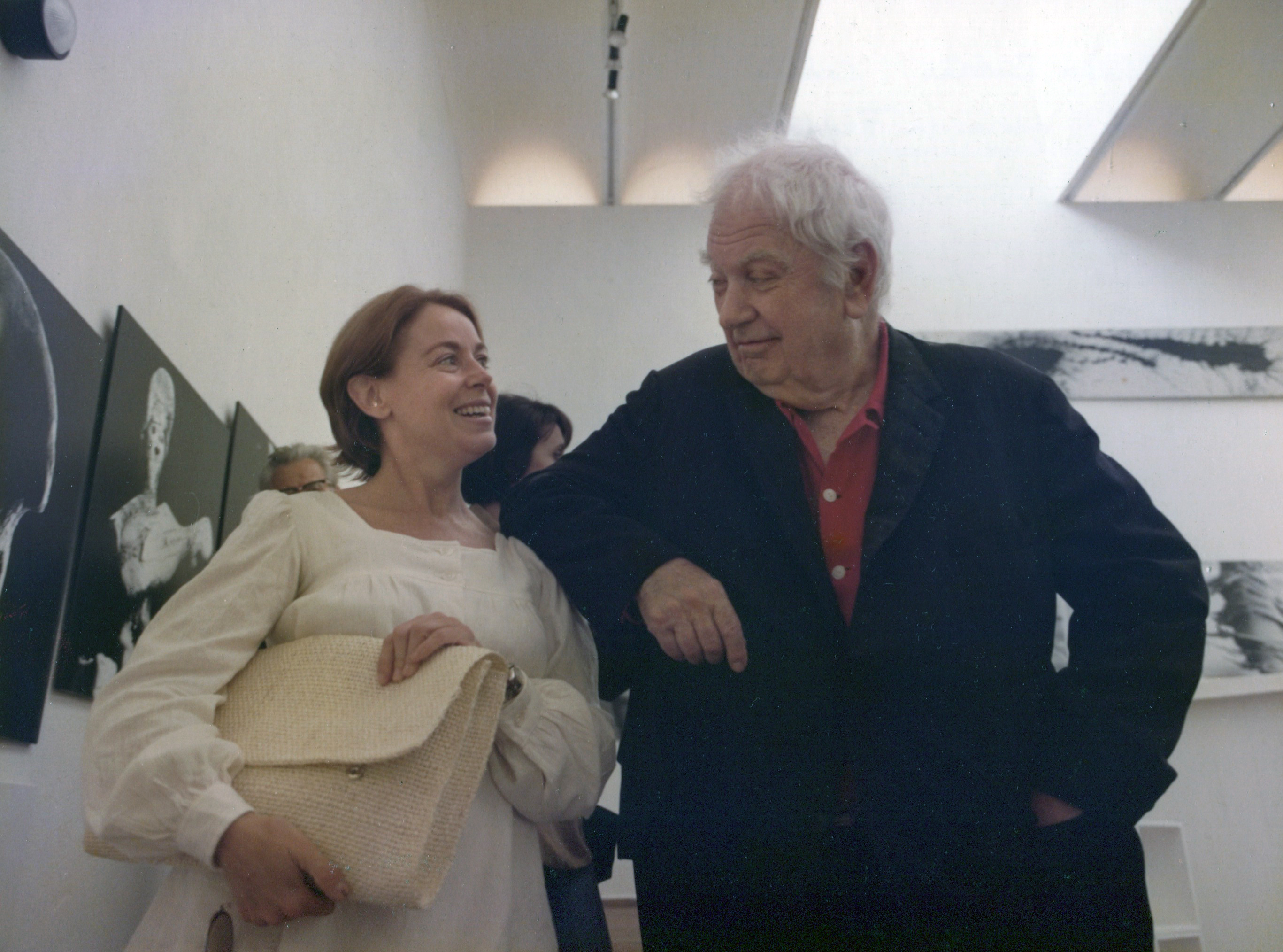 Maria Lluïsa Borràs y Alexander Calder conversando alrededor de 1968 y 1969 en la Fundació Miró.